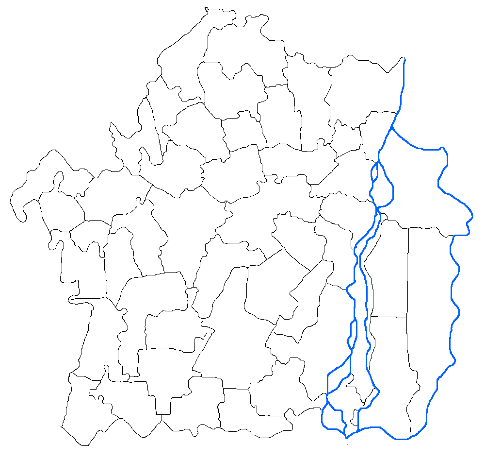 Categorie:Hărți ale județului Brăila